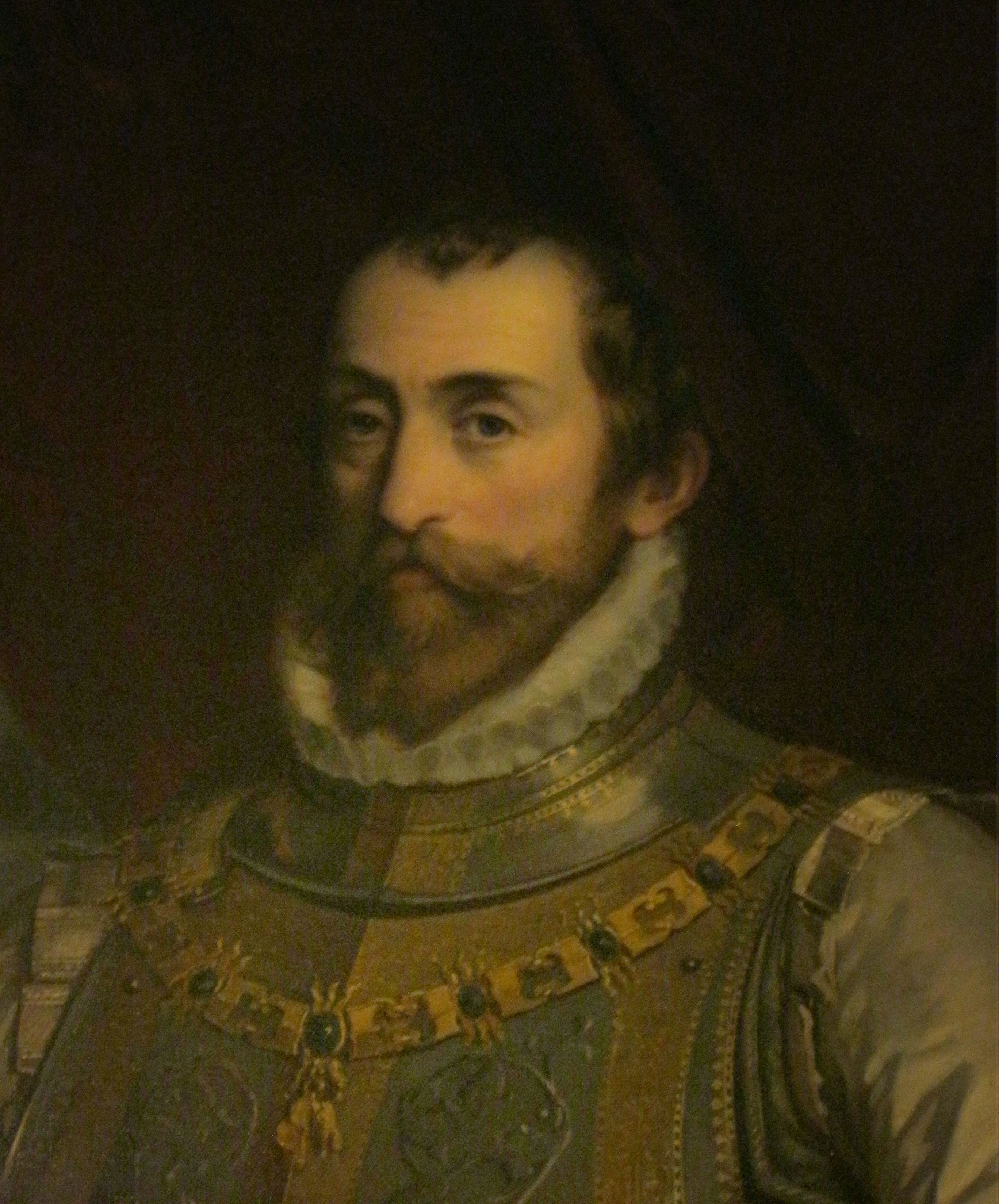 Details aus dem Ahnensaal im Schweizertrakt der Hofburg zu Wien. Dieser Saal diente zuletzt Kronprinz Rudolf als Speisezimmer, heute ist er Teil des Bundesdenkmalamts in Wien, Porträt Maximilian II. Object location48° 12′ 25.61″ N, 16° 21′ 56.93″ E